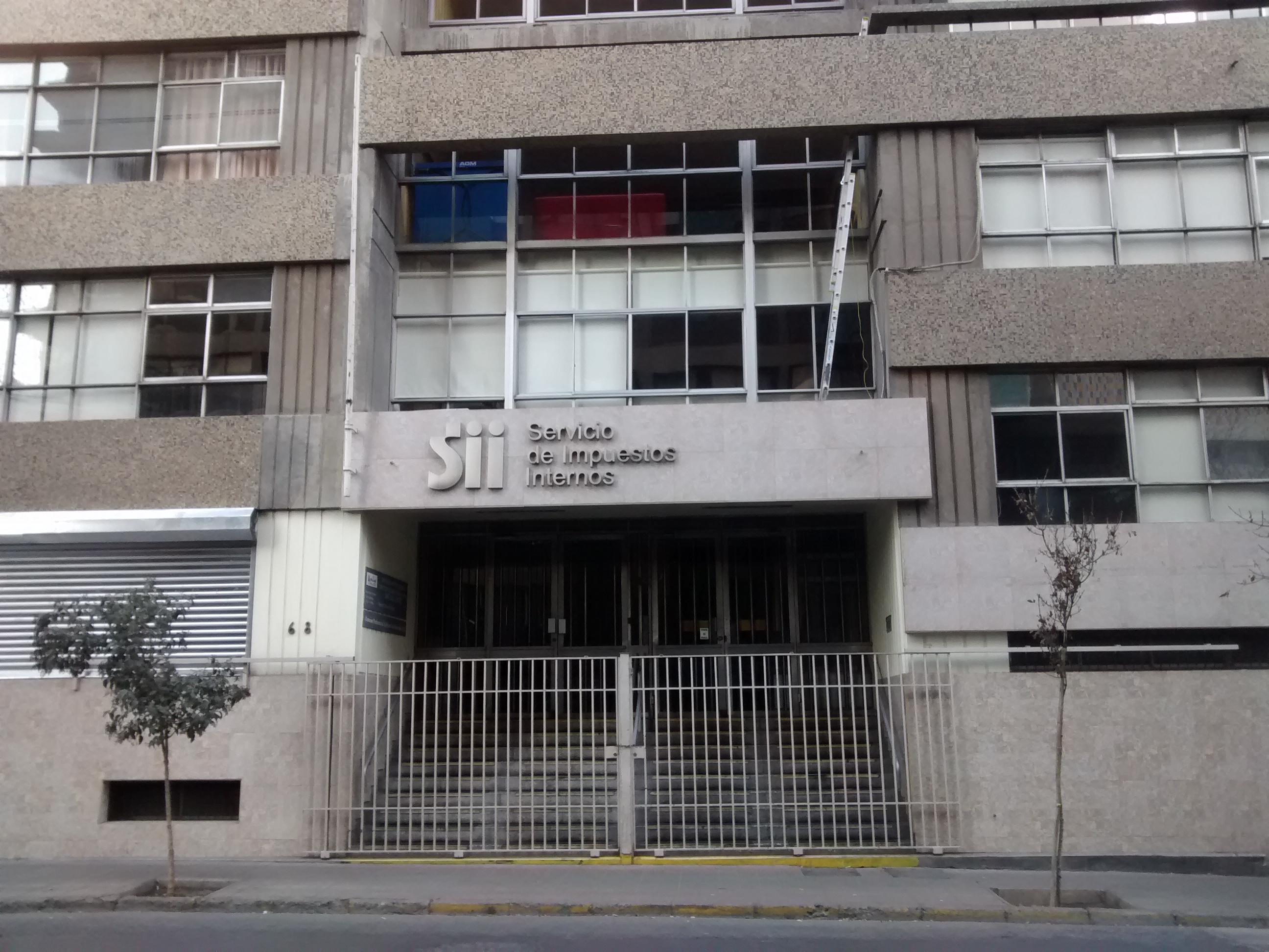 Dirección Regional Santiago Centro del Servicio de Impuestos Internos, calle Alonso Ovalle 680, Santiago de Chile.